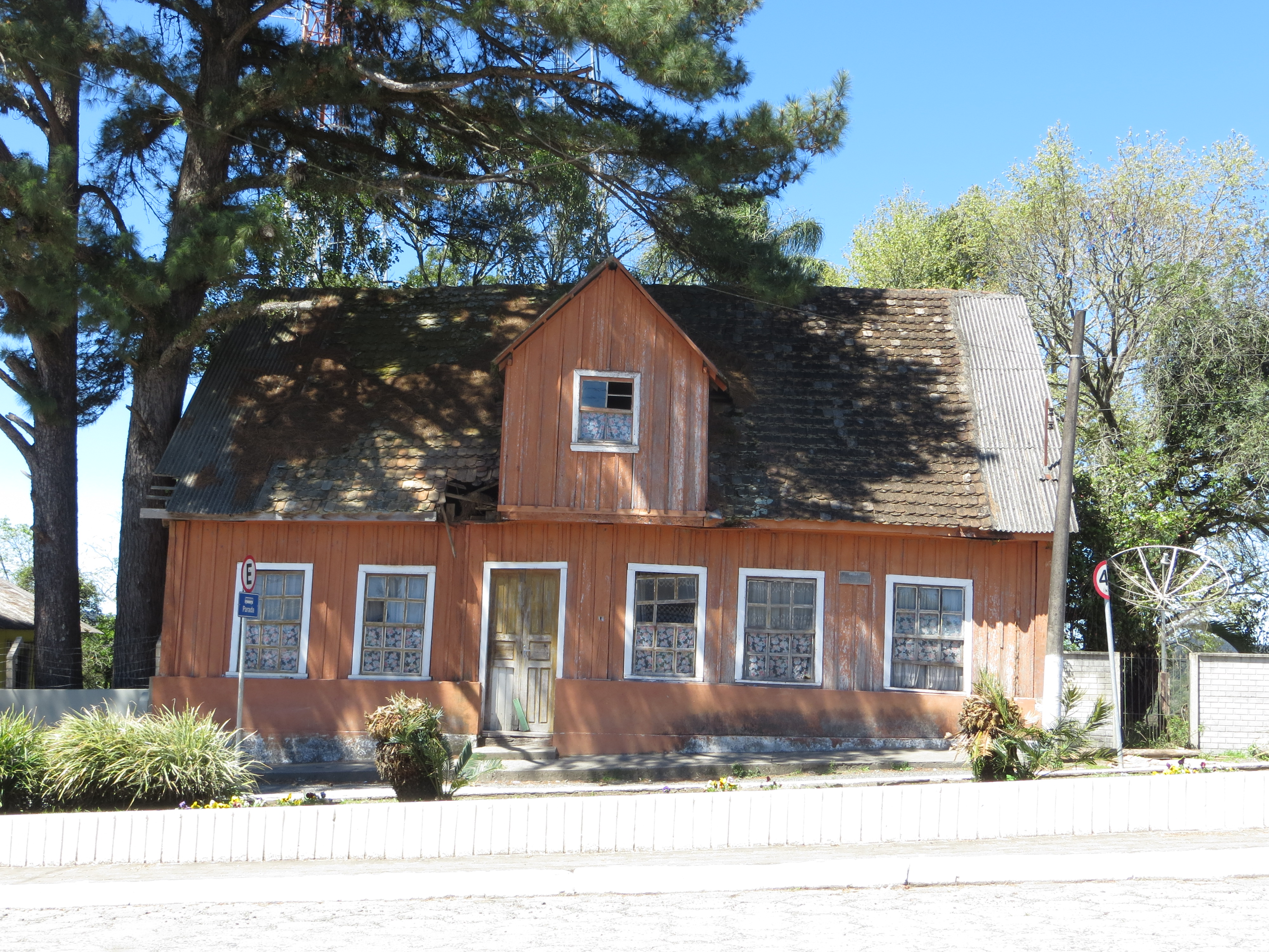 Casarão histórico em São João do Triunfo, estado brasileiro do Paraná, região sul do país.